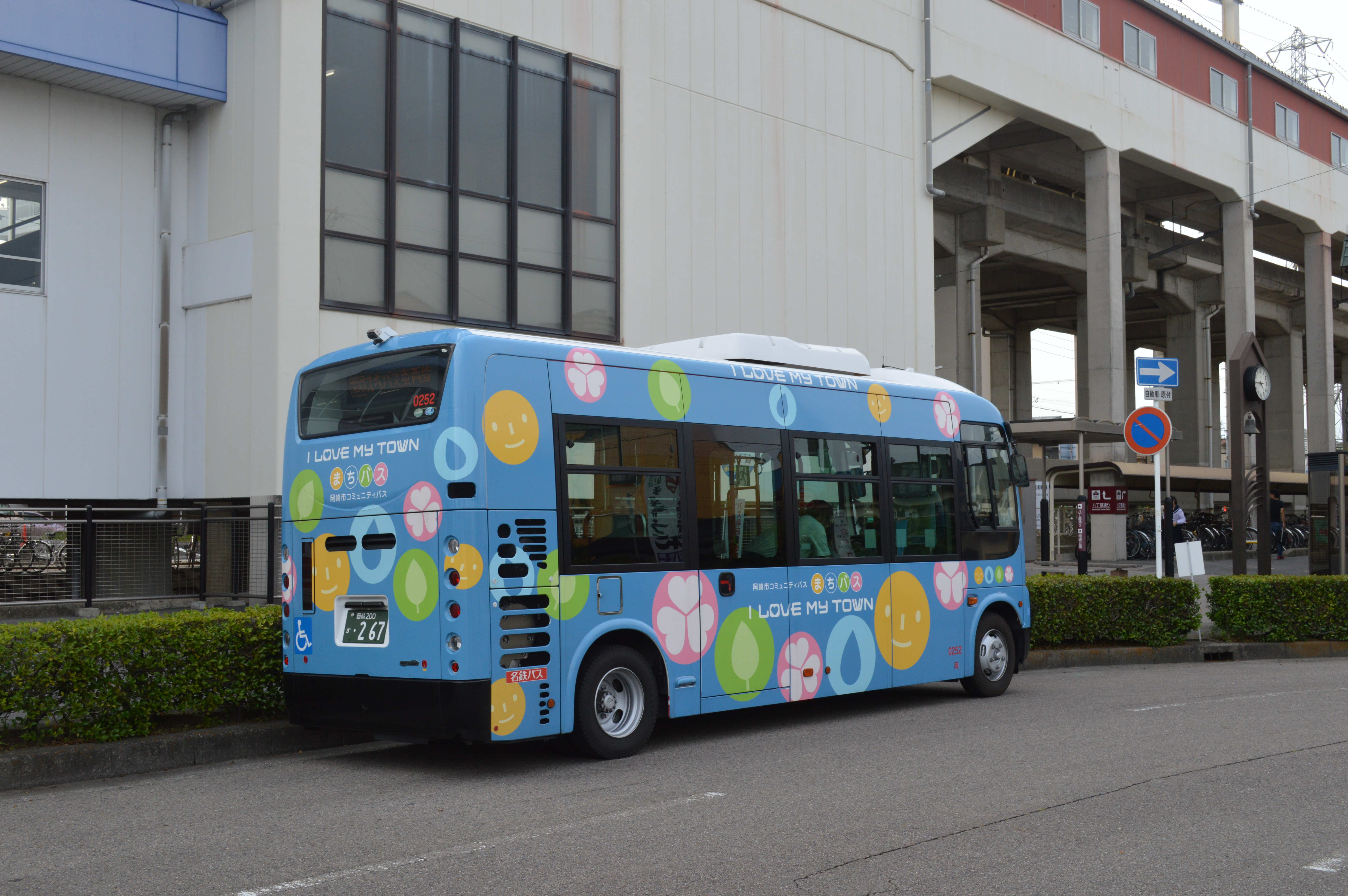 愛知環状鉄道中岡崎駅停留所に停車中のまちバス